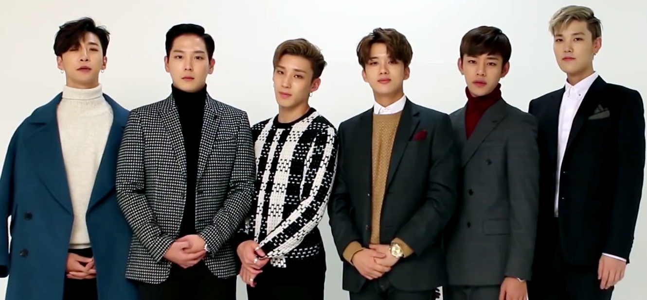 [TV10] B.A.P 10+star 11월 화보 촬영 영상